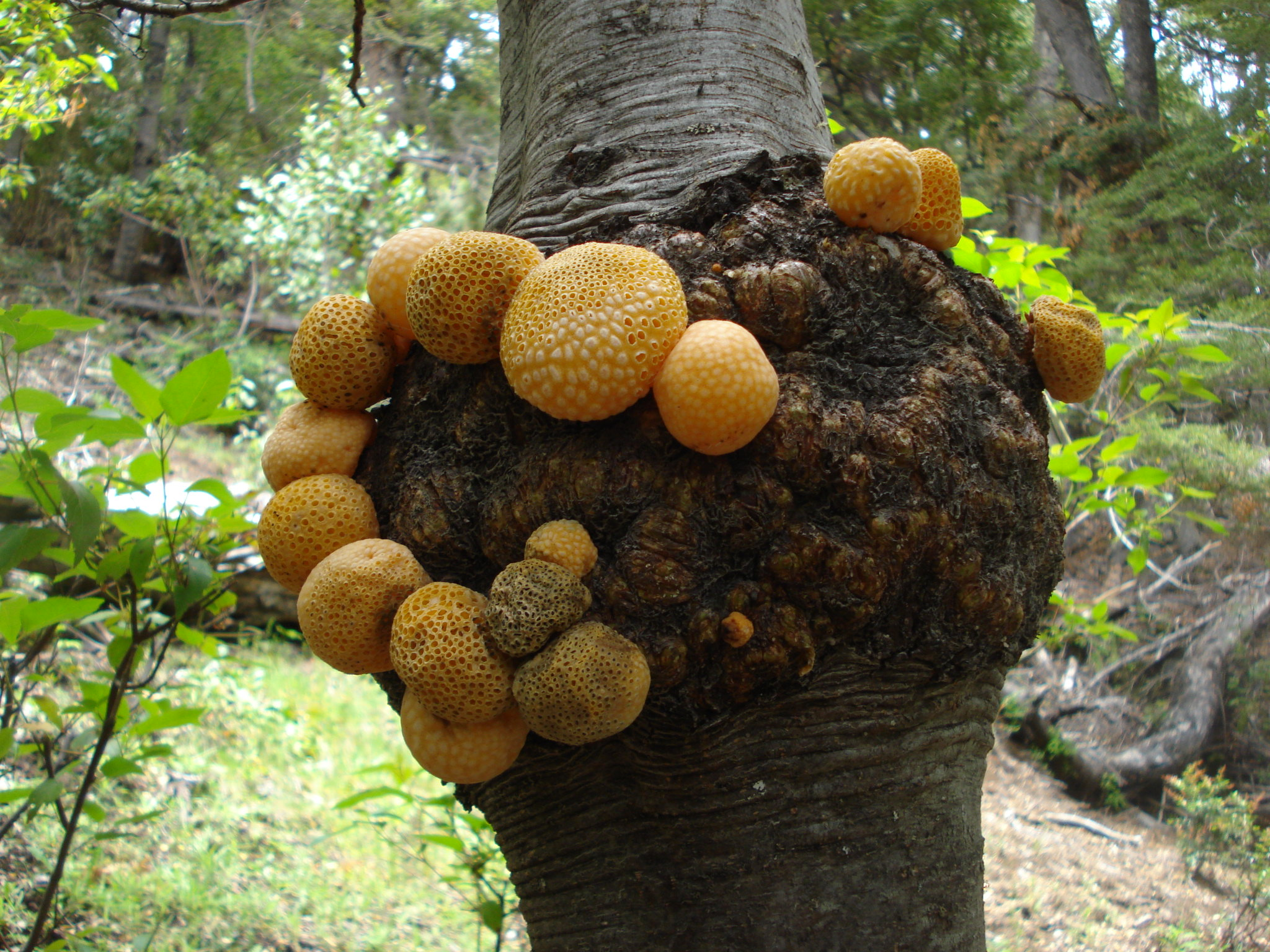 Hongo Llao Llao (Cyttaria harioti)